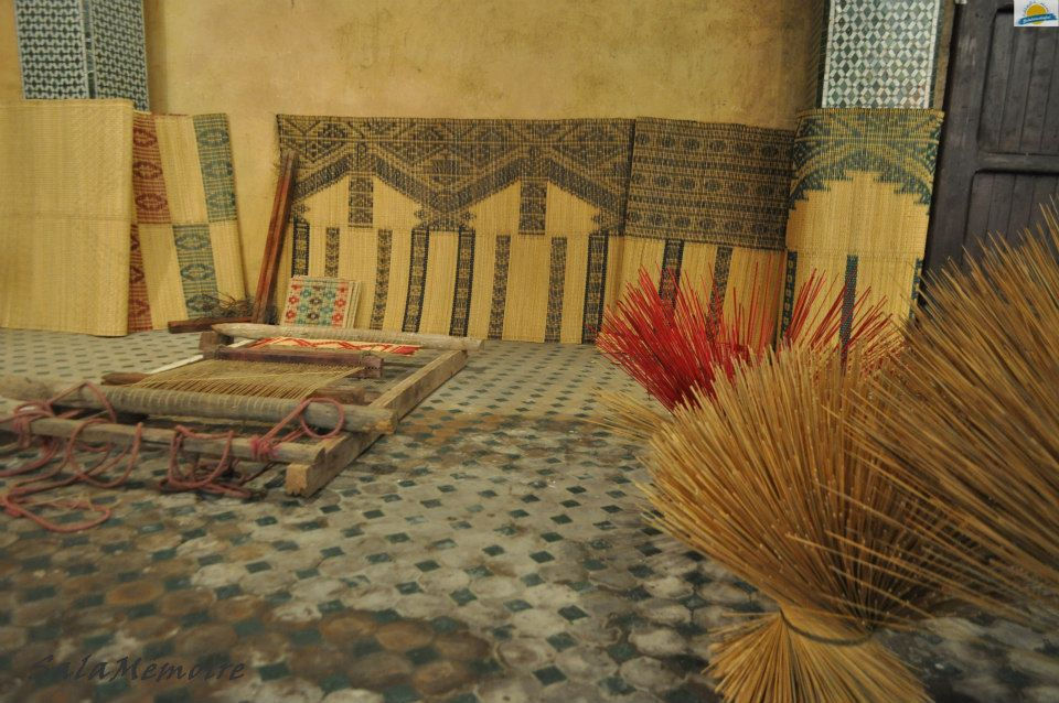 Nattiers Musée Bab El Khemiss Salé (Photo de l'association Sala Al-Moustaqbal)